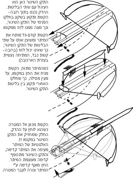 זוהי דרך הפעולה של חלק מרובי הקשת הקלים והכבדים. איור זה נועד לערך he:קשת אופקית. הוא מתאר את מנגנון ההפעלה של חלק מרובי הקשת. את התמונה יצרתי בעצמי בתאריך 11.2.05 באמצעות תוכנת Photoshop 6. אני מתכוון לשלב אותה בערך שלה. אם אני אראה שפריסת הדף לא נראית טוב עם התמונה הזו, אוסיף תמונה בלי ההסברים המילוליים, ואת ההסברים אכתוב בנפרד כחלק מהמאמר. תמוז 20:00, 11 פבר' 2005 (UTC)